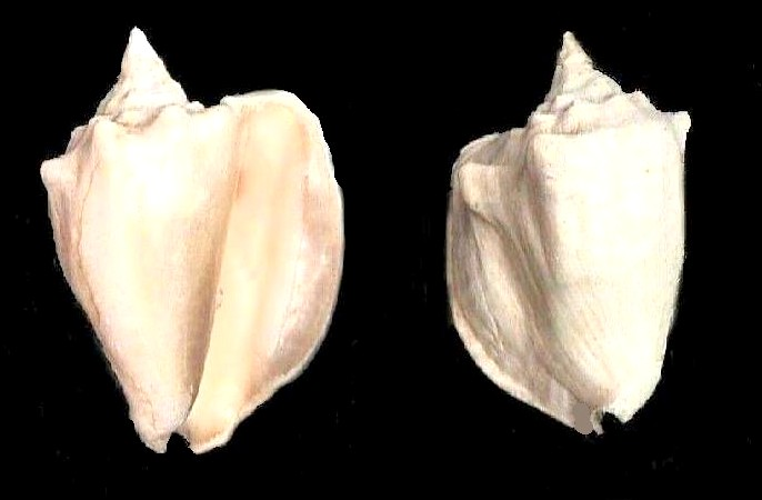 Strombus costatus del Archipiélago Los Roques, Dependencias Federales - Venezuela.